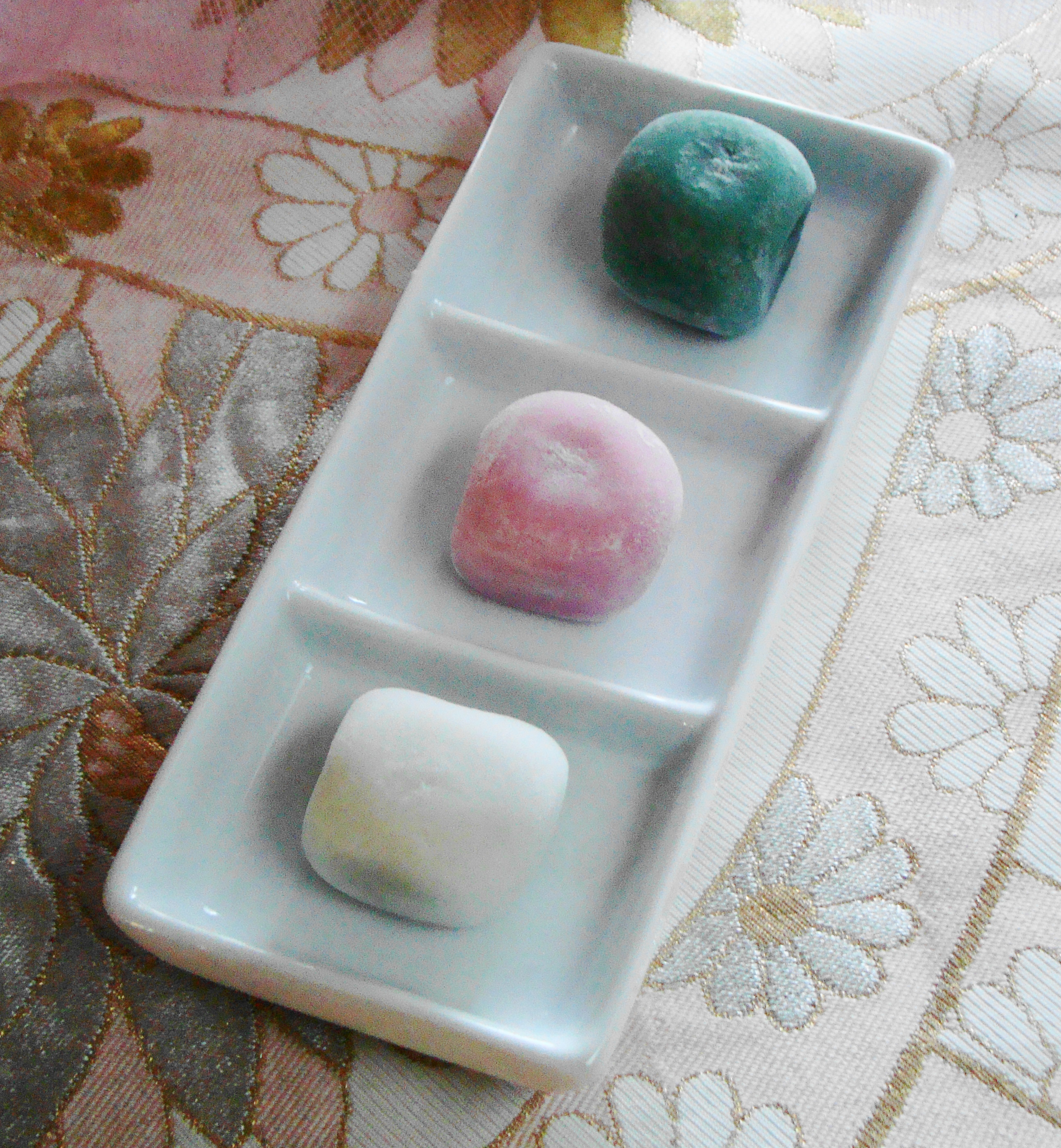 Vegan Sanshoku Dango